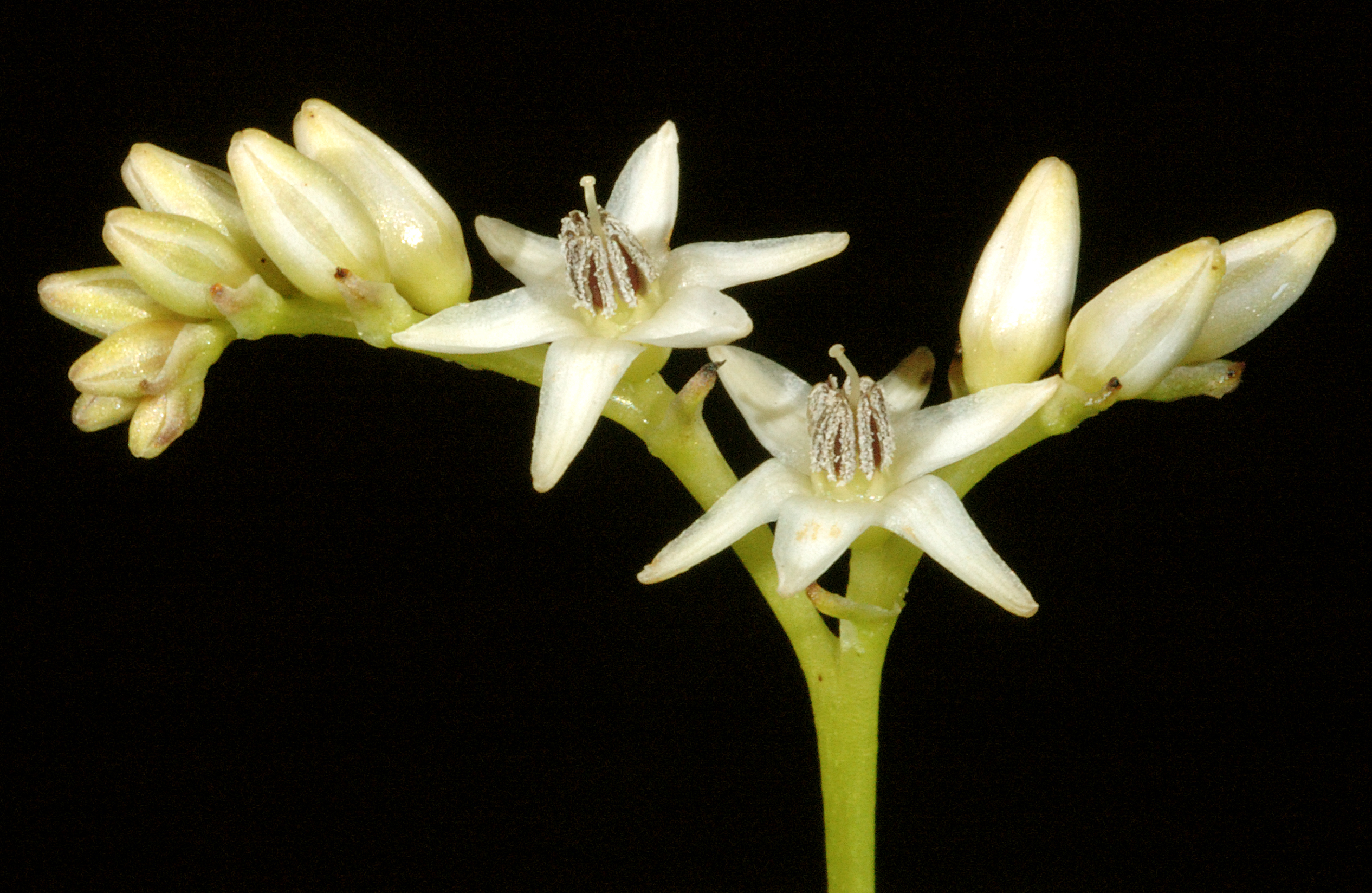 KRT3052